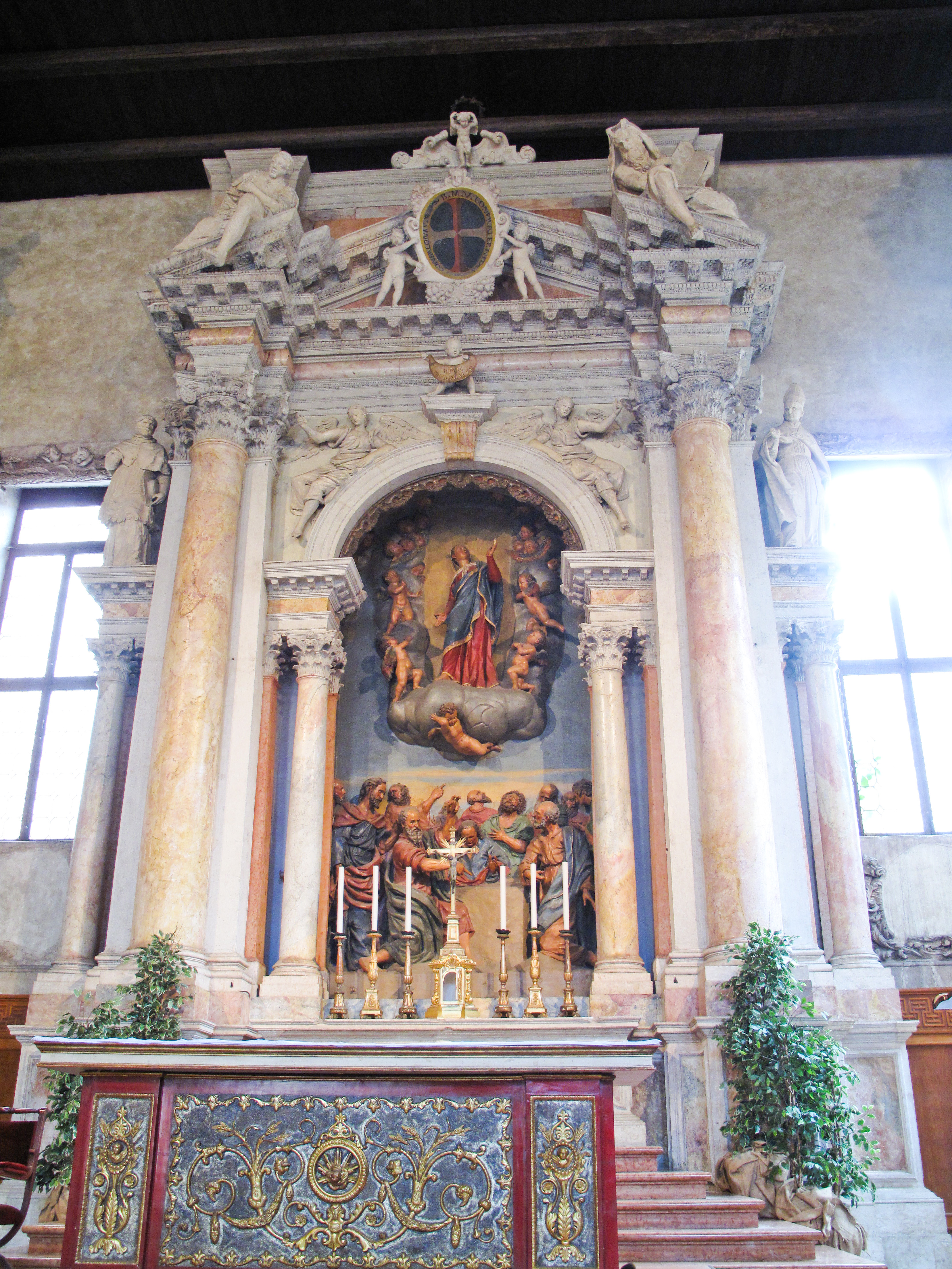 Vicenza - Oratorio del Gonfalone - Altare e Assunzione di Maria, tela di Albanese